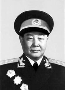 1955年赵尔陆上将授勋照